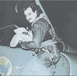 Il capitano di corvetta argentino Roberto Curilovic discende dal suo Super Etendard dopo la missione in cui è stata affondata la nave britannica Atlantic Conveyor, durante la guerra delle Falkland